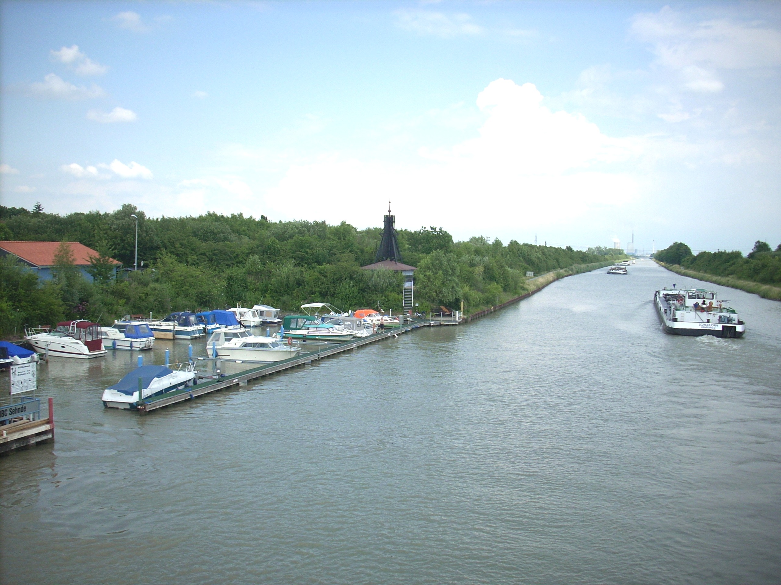 Mittellandkanal bei Sehnde, Germany